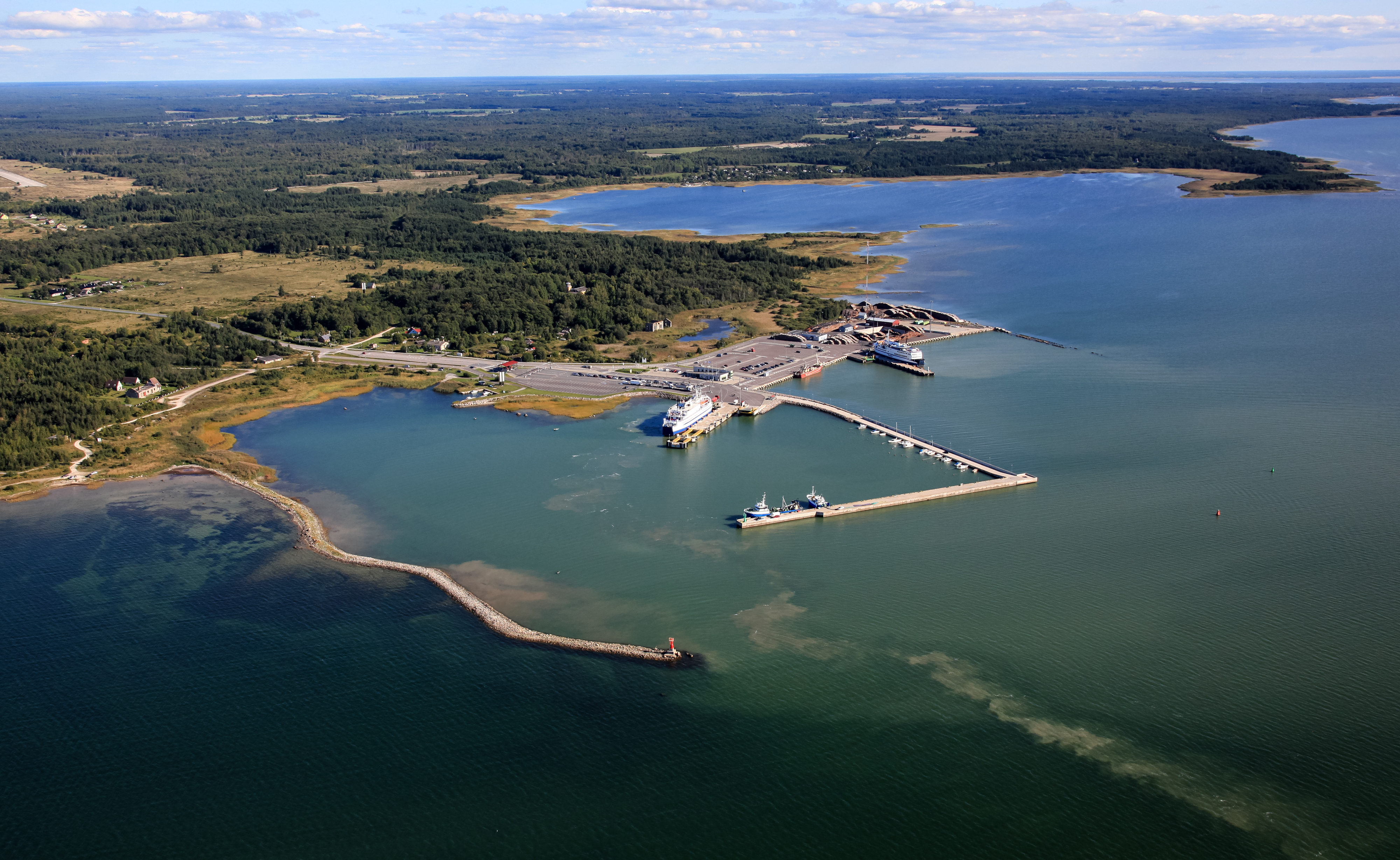 Rohuküla sadam